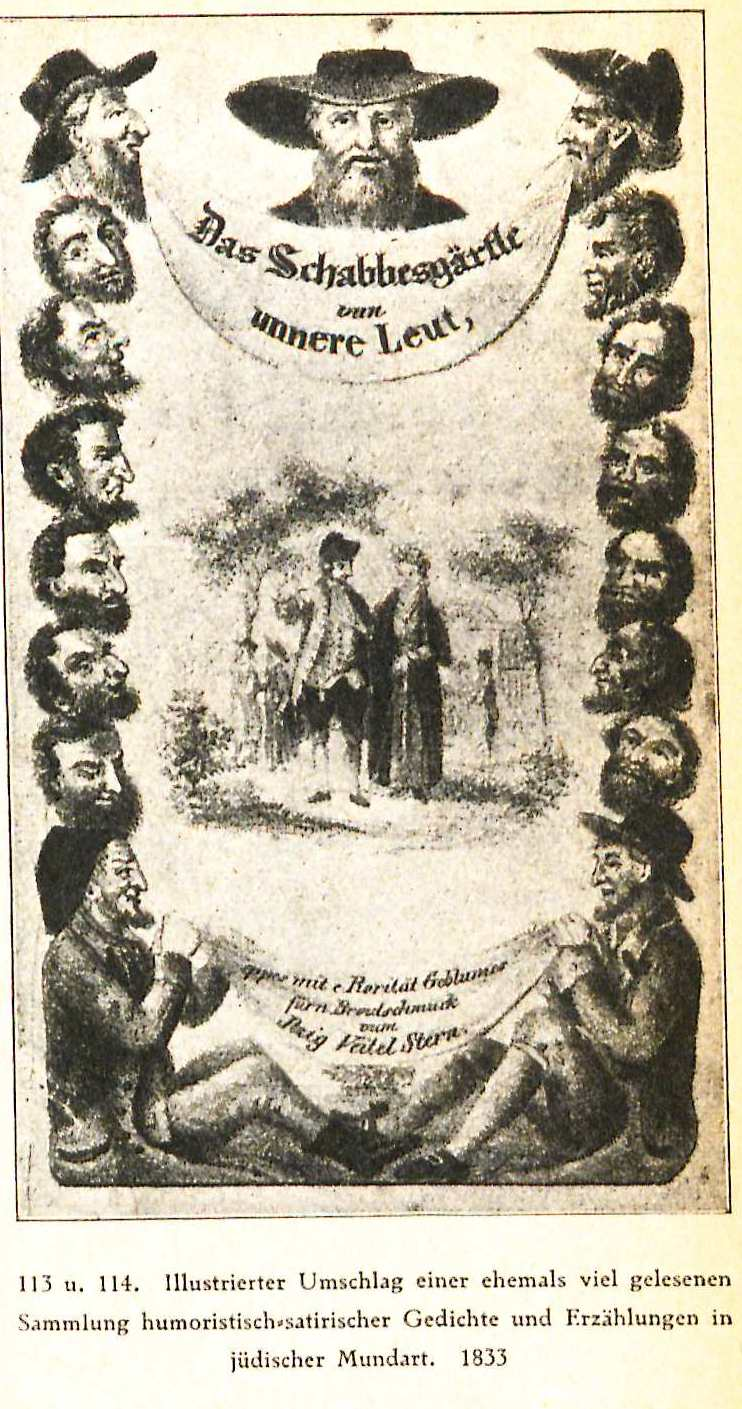 Das Schabbesgärtle vun unnere Leut, Eppes mit e Roretät Geblumes fürn Broutschmuck . Itzig Feitel Stern's Schriften, 4. Meissen : Goedsche 1833 Autor: Heinrich Holzschuher (zugeschrieben) Sammlung von Gedichten und Erzählungen in Jjiddisch